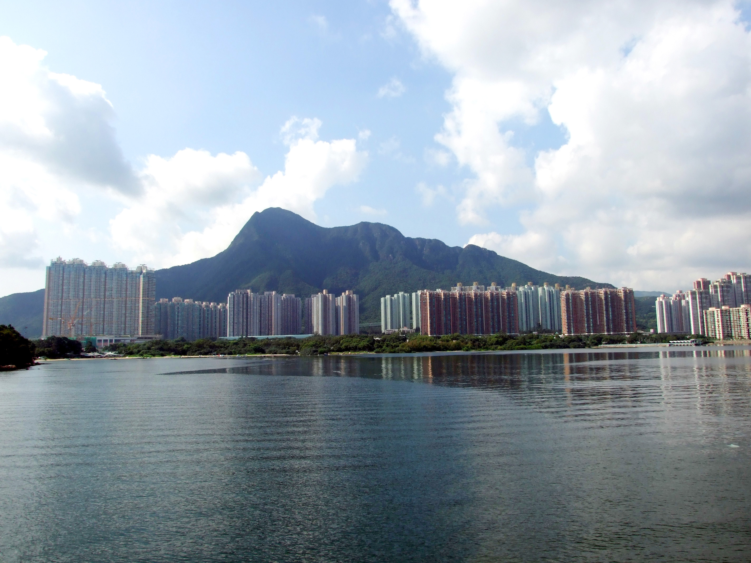 中文（香港）: 馬鞍山新市鎮北部